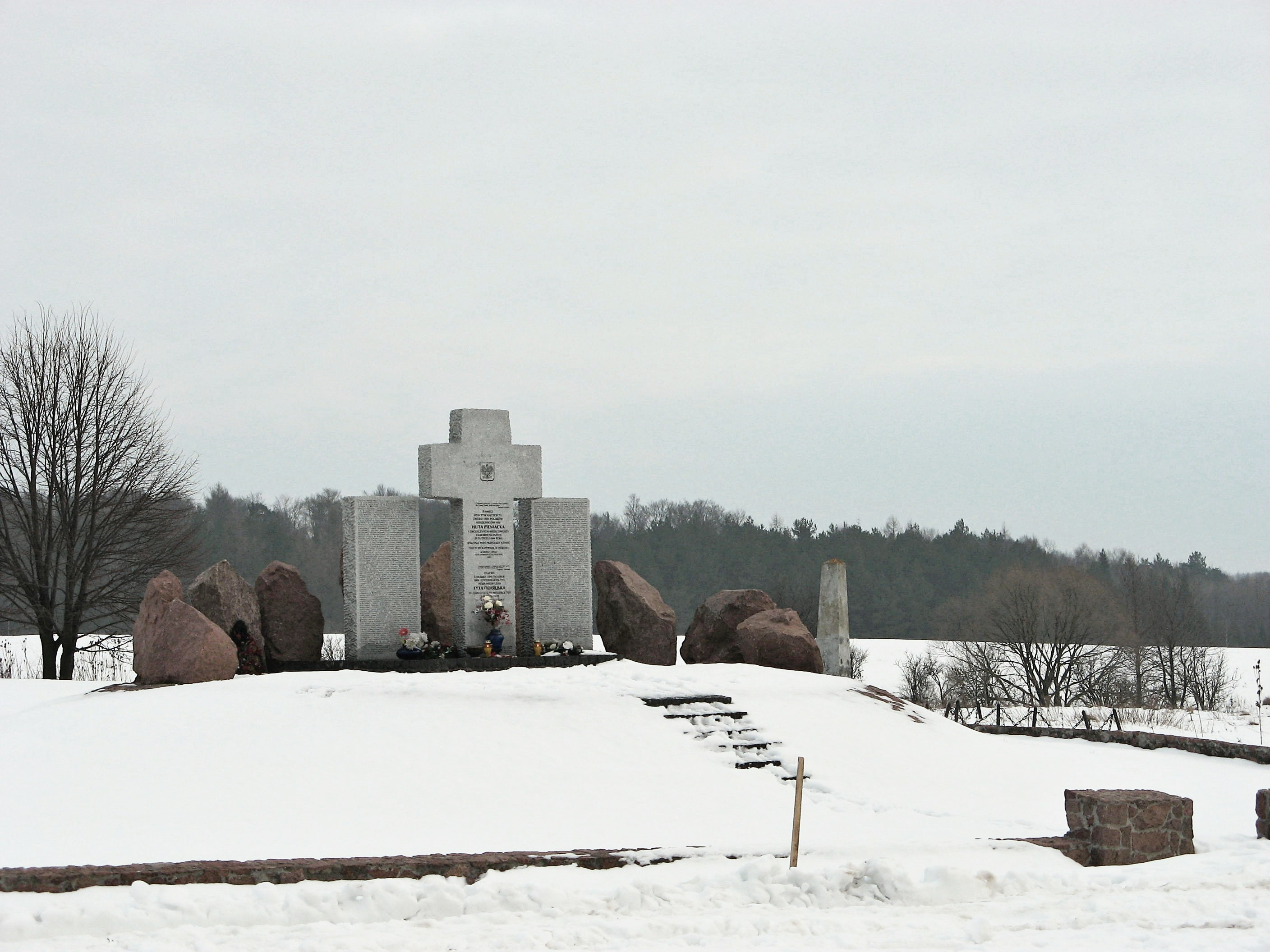 Pomnik poświęcony pamięci ponad 1000 Polaków zamordowanych przez 5 pułk policyjny SS i ukraińskie oddziały SS Galizien w Hucie Pieniackiej 28 lutego 1944 roku.